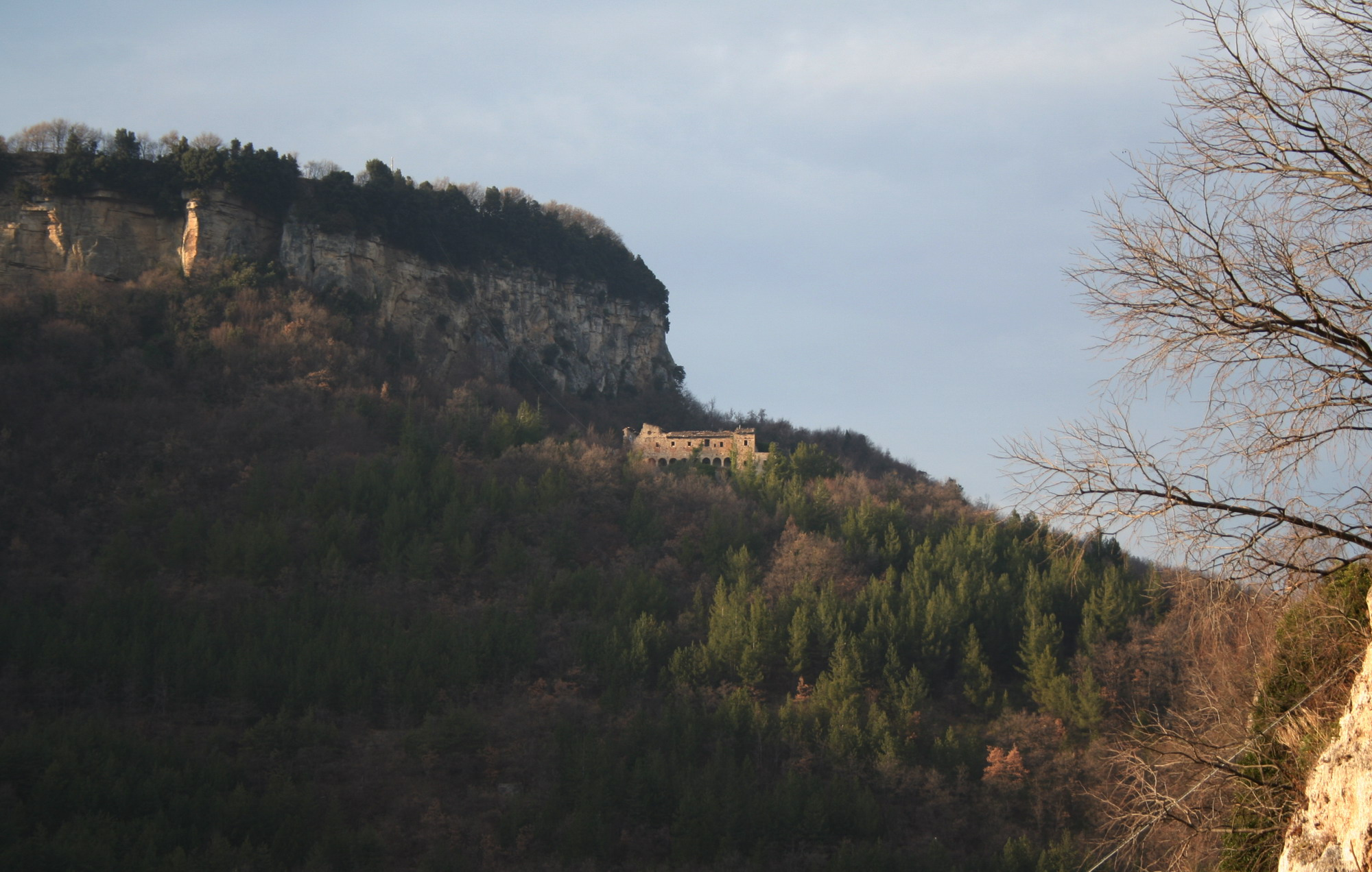 Castel Trosino (Ascoli Piceno) – Convento di San Giorgio sulla collina di Rosara, esterno giorno, proprio scatto Sibilla.io "Utilizzo concesso" Ticket#2007040410014627 (ticket per le immagini) This file is licensed under Creative Commons 2,5 license